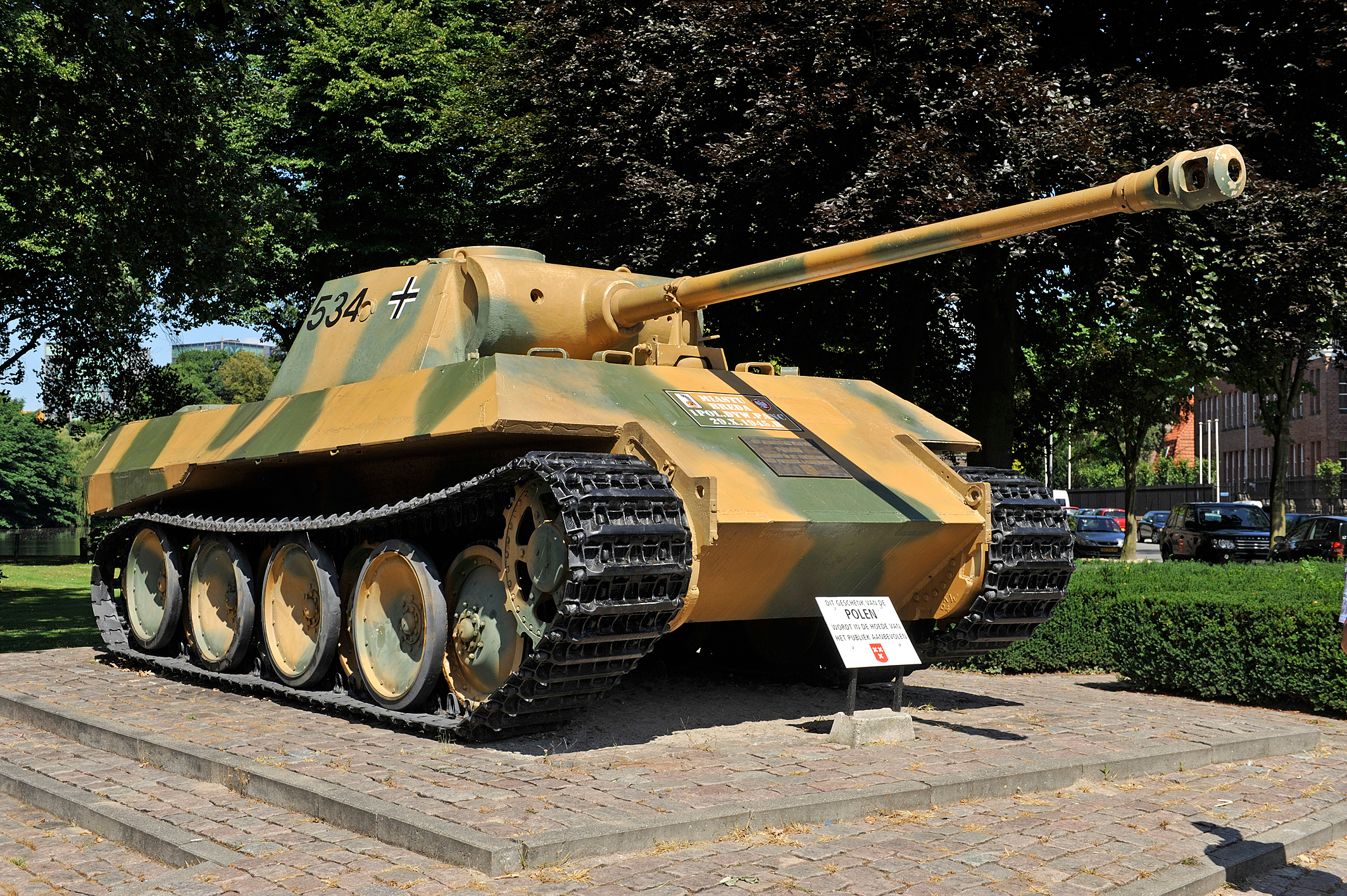 Breda, Panther D-Tank